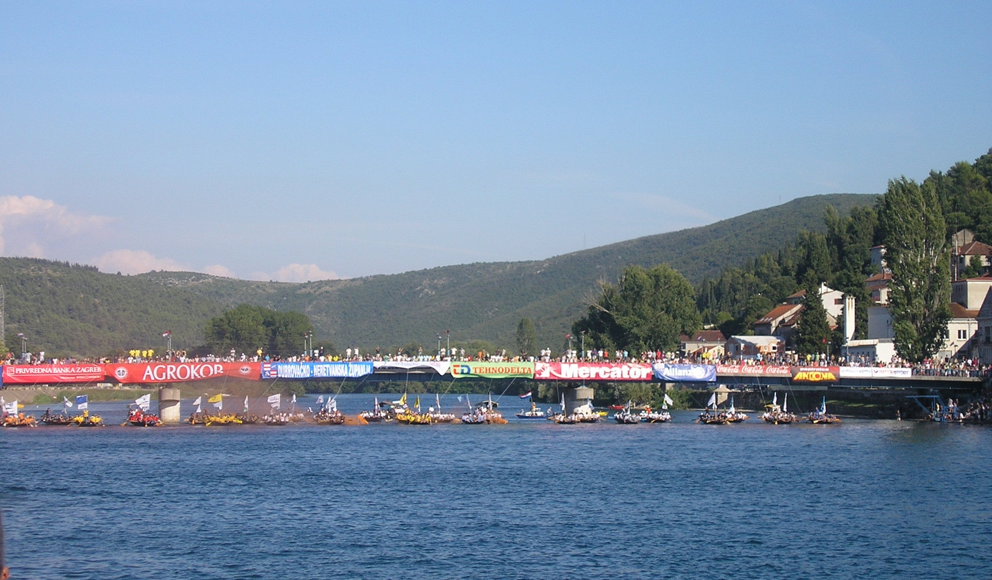 Lađe na startu u Metkoviću (Maraton lađa 2011.)